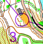 2019年5月26日に開催された「第2回つるまいOLCトレイルO大会」で使用したBクラスの地図。